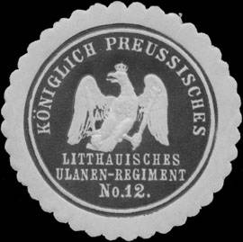 Sealing stamp Title: K.Pr. Litthauisches Ulanen-Regiment No. 12 Description: Place: Insterburg size: 4 cm